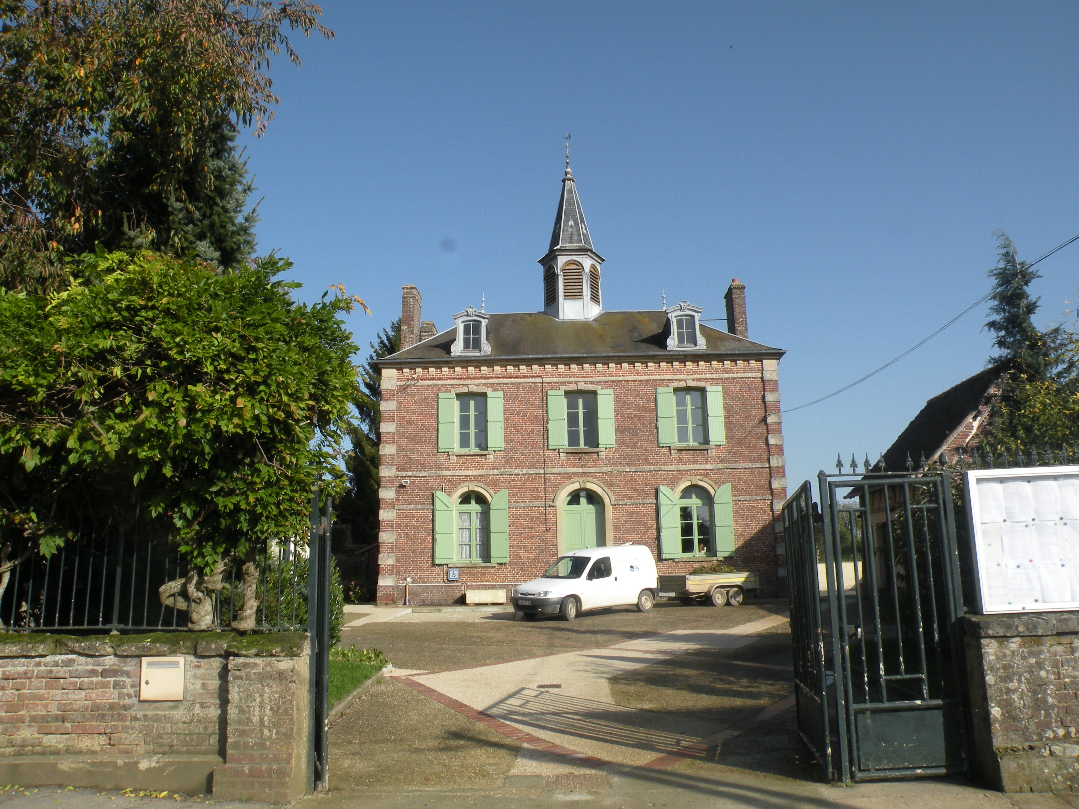 mairie Pierrefitte-en-Beauvaisis